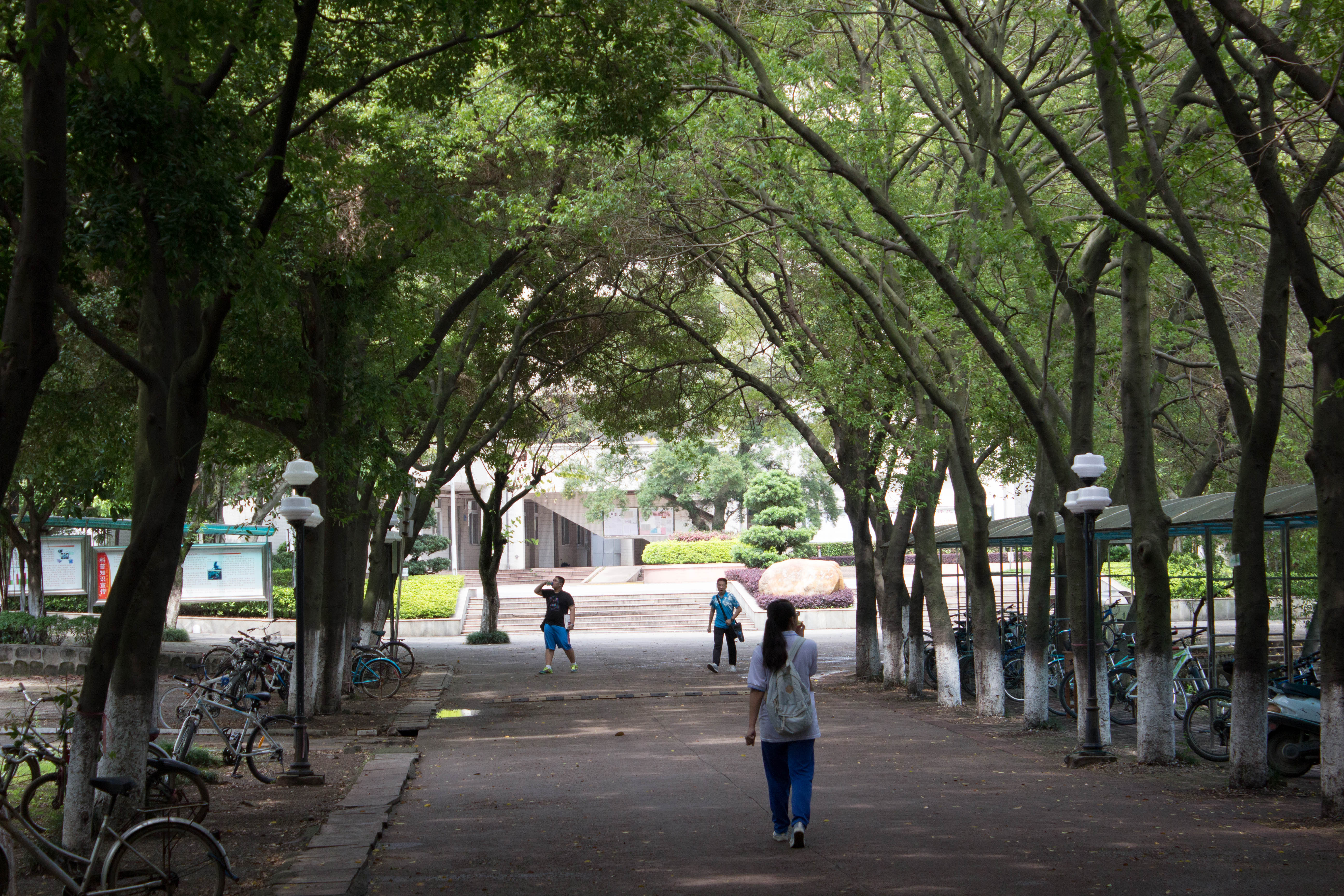 广东北江中学校道的照片